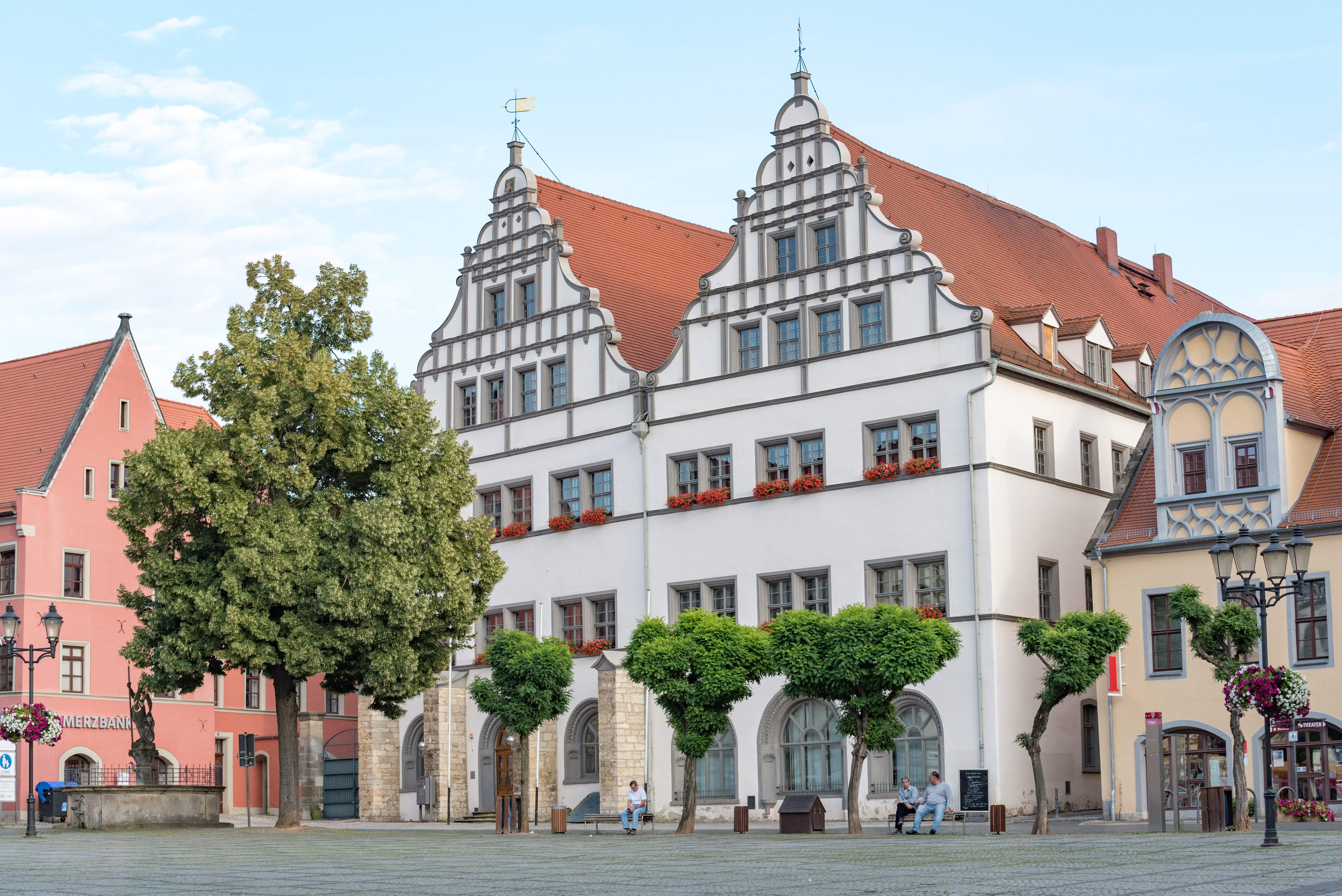 Naumburg (Saale), Markt 7